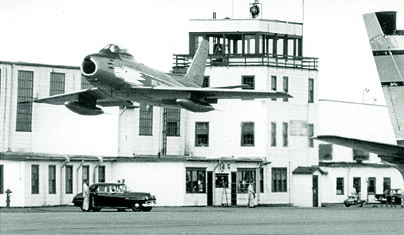 Golden Hawks Sabre